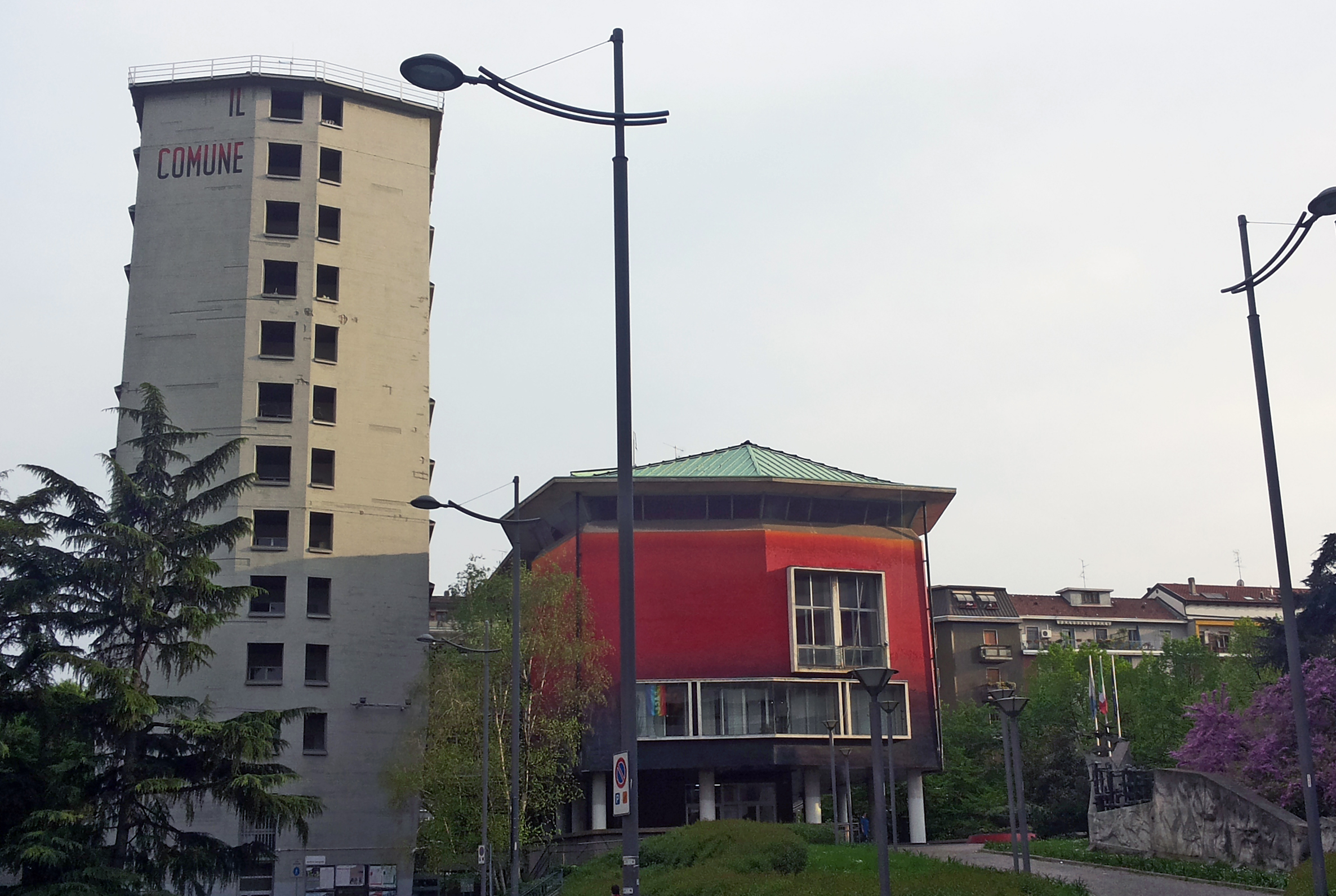 Municipio di Sesto San Giovanni, costruito dal 1964 a 1965 su progetto di Piero Bottoni.